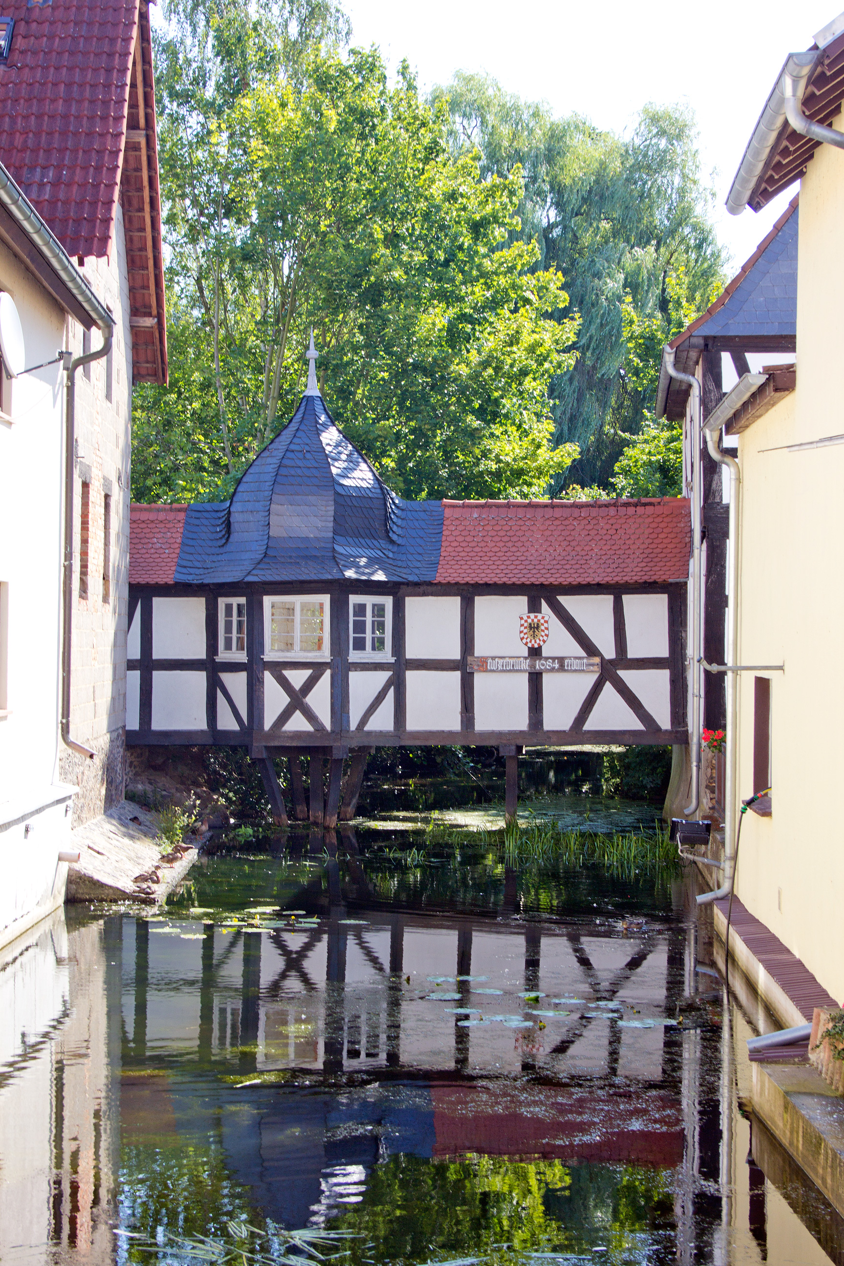 Die Seufzerbrücke über dem Mühlbach in Florstadt-Staden.